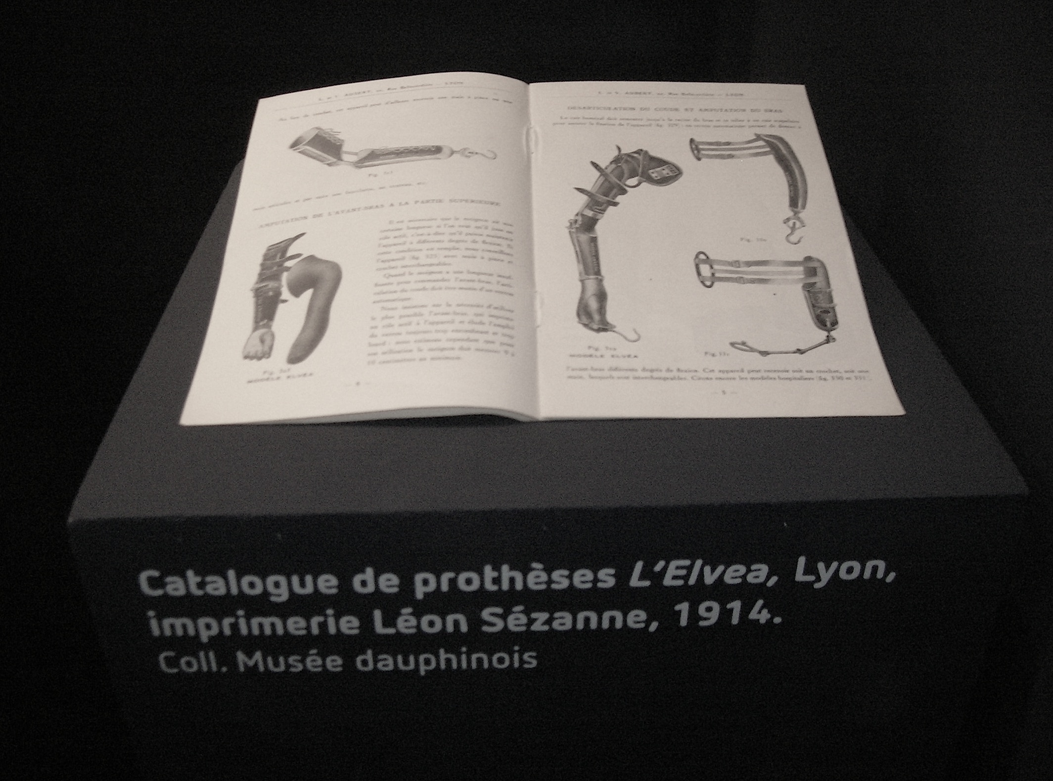 Catalogue de prothèses L'Elvea, Lyon, imprimerie Léon Sézanne, 1914. Collection Musée Dauphinois, Grenoble.